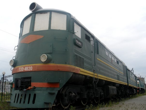 ТЭ3-4820 в Екатеринбургском железнодорожном музее